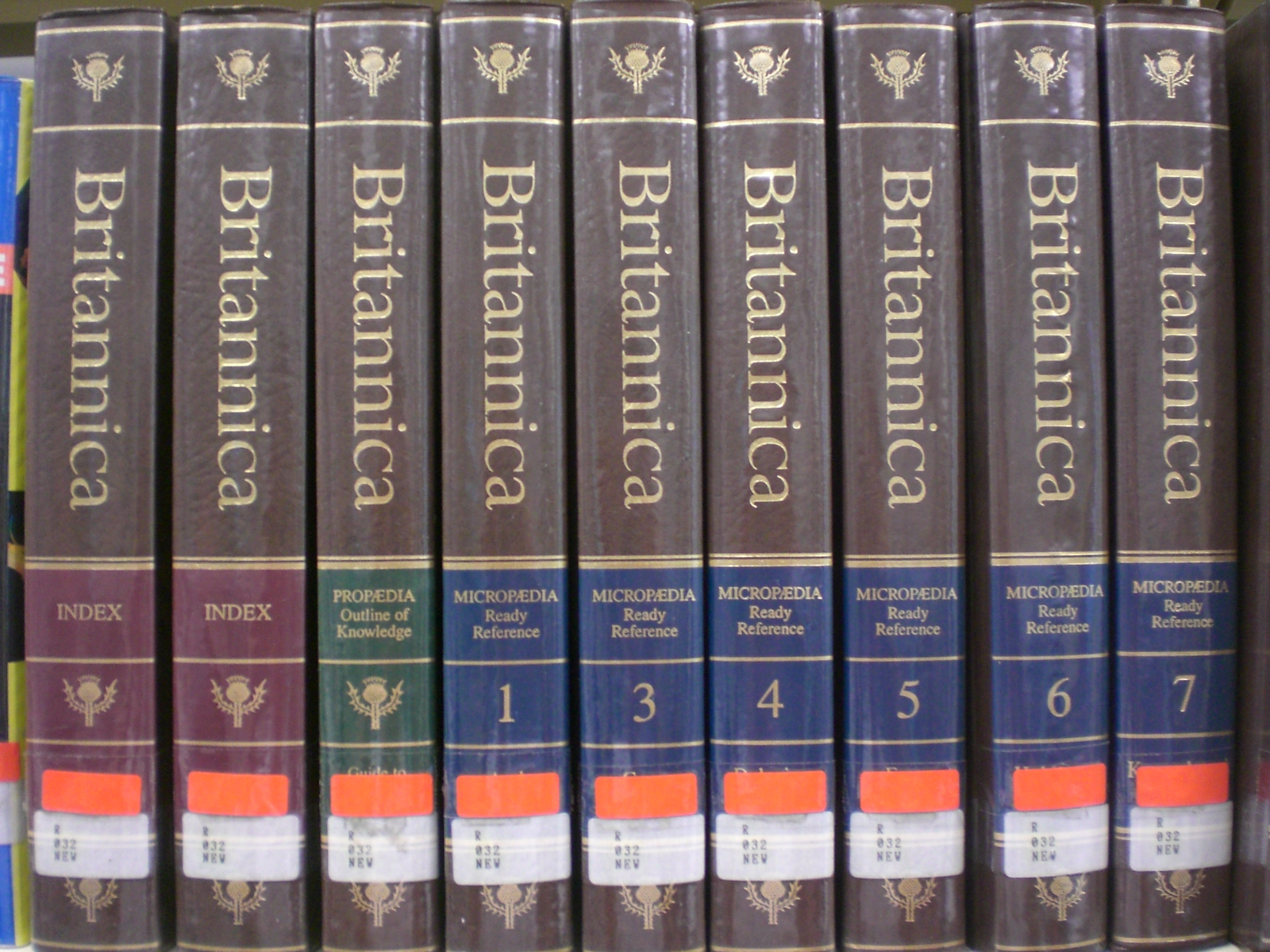 Britannica_Micropedia